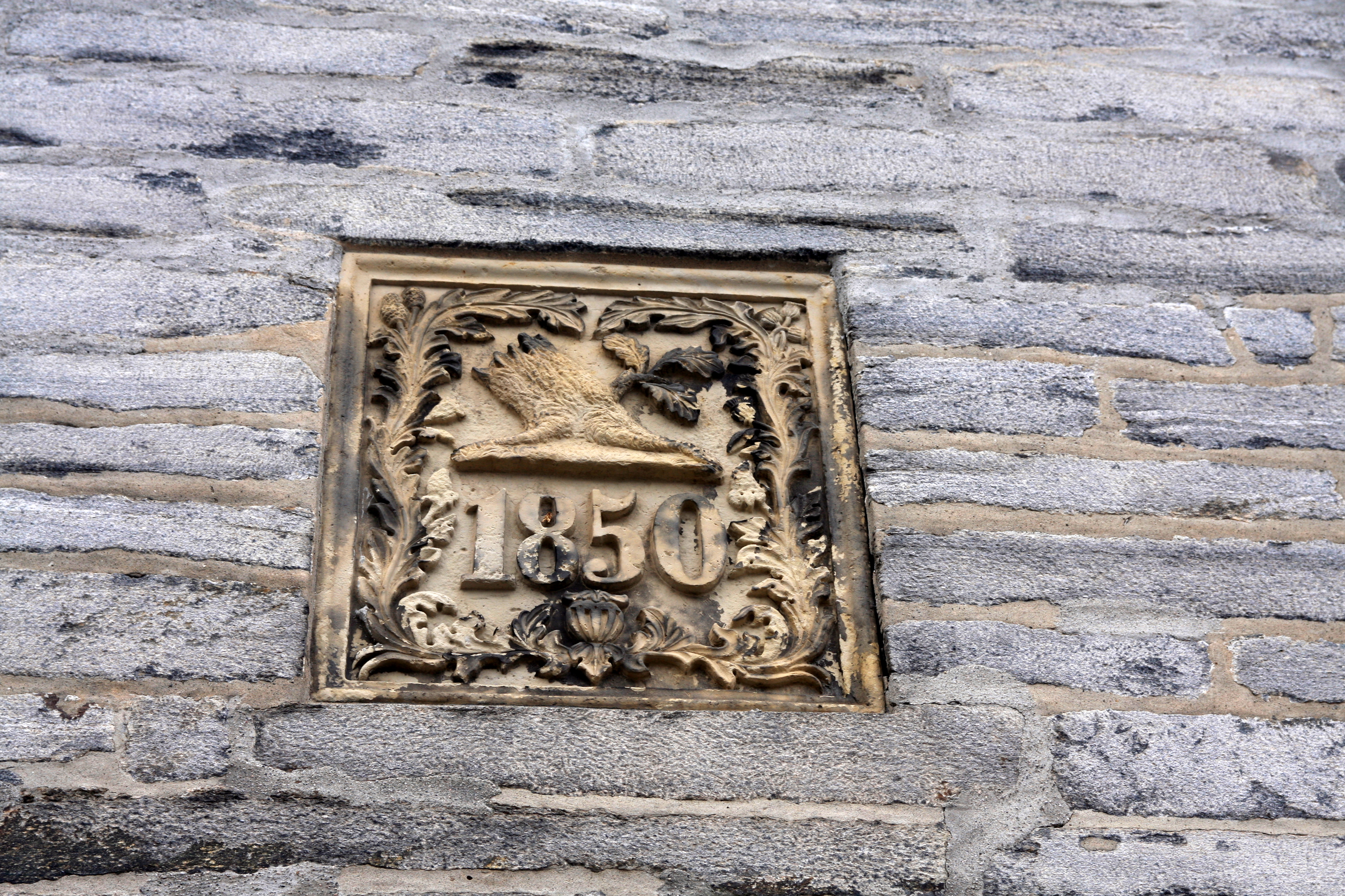 Valbergtårnet detalj